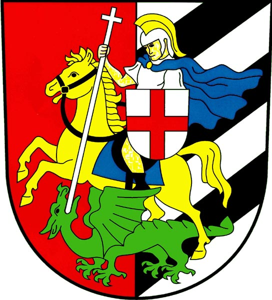 Znak obce Jiříkov (okres Bruntál)